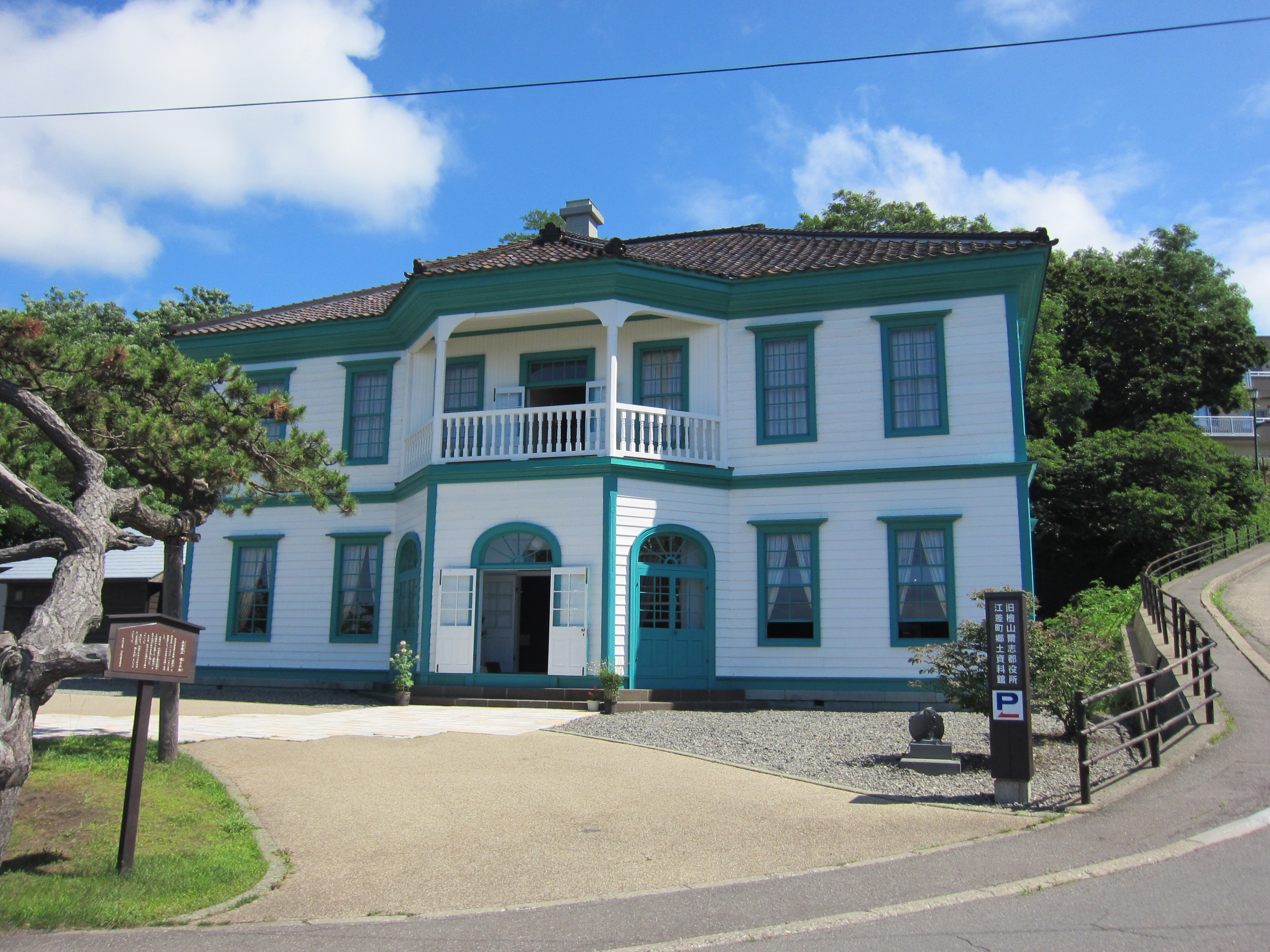 旧檜山爾志郡役場・江差町郷土資料館（2013年8月3日撮影）